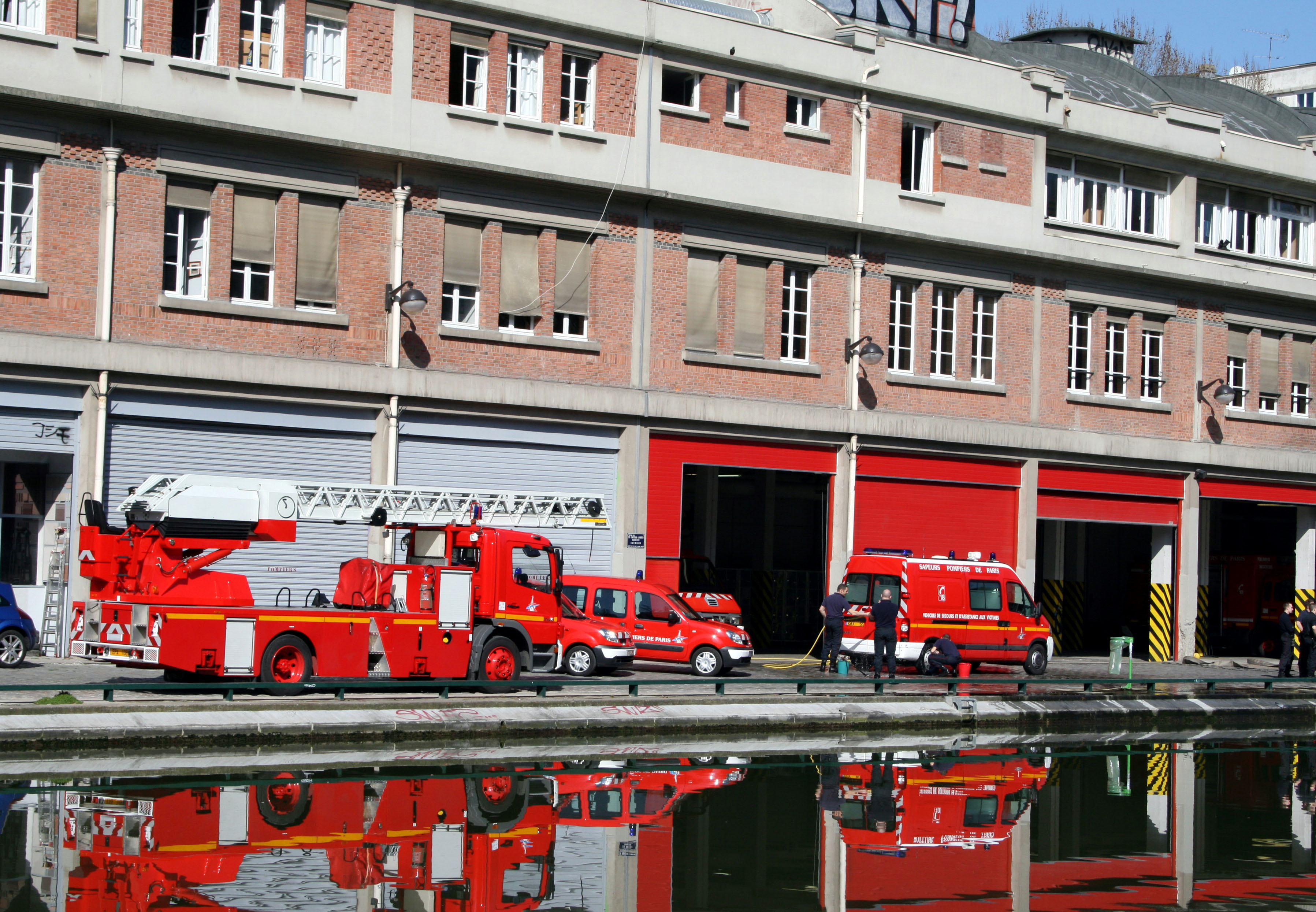 Caserne de pompiers sur le canal Saint-Martin à Paris